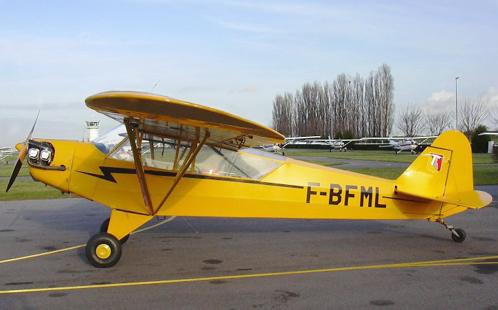 Piper Cub Le Piper Cub de l'Aéroclub Hispano Suiza sur l'aérodrome de Pontoise Cormeilles-en-Vexin photographié le 13 janvier 2005. Le type est le L-4H, avion de liaison et d'observation dérivé du Piper J3 Civil. Il présente une surface vitrée plus importante que le modèle civil afin de faciliter l'observation. 2005 Philippe Gouyet